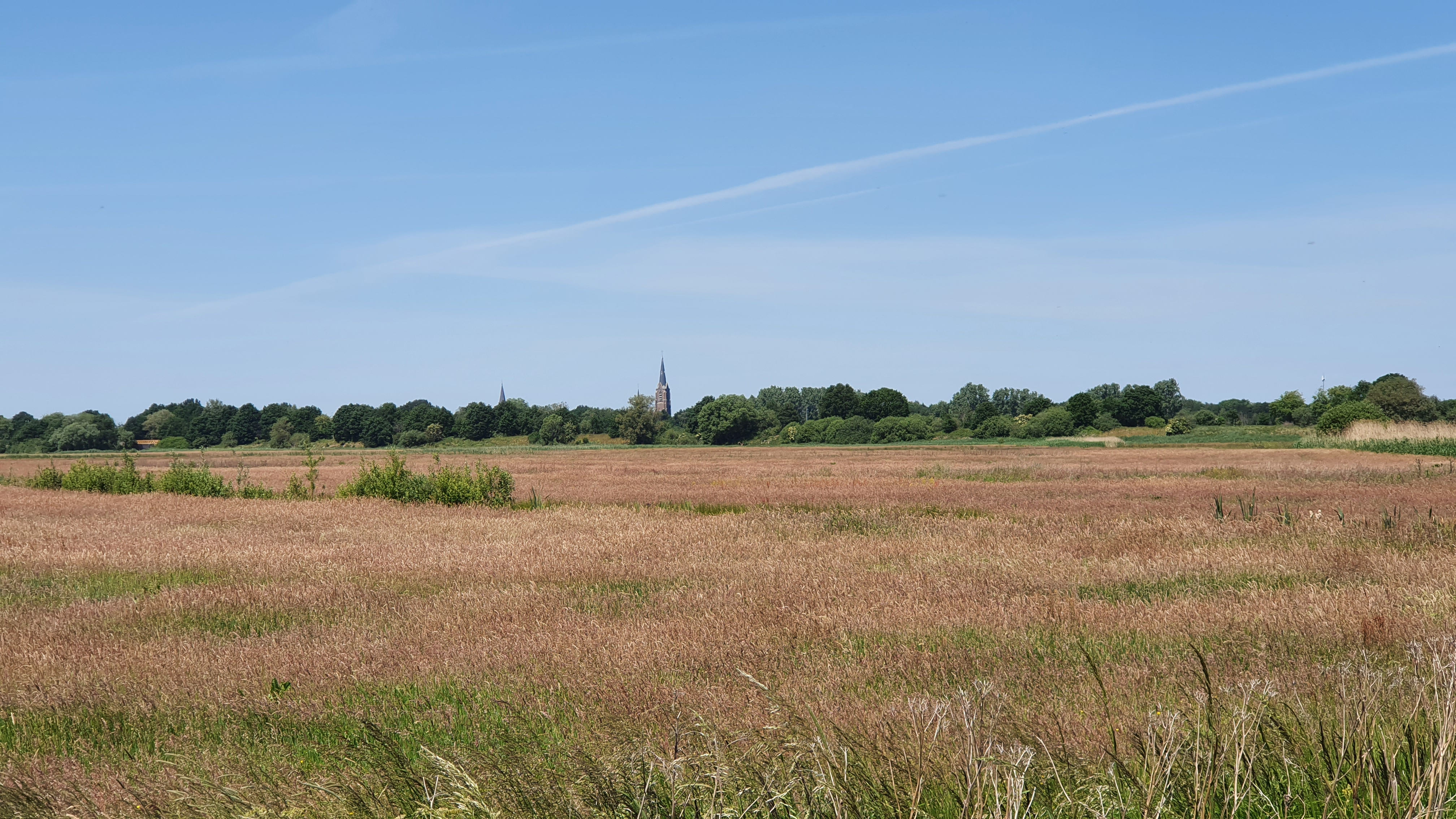 polder eind mei 2020. Erg droog.